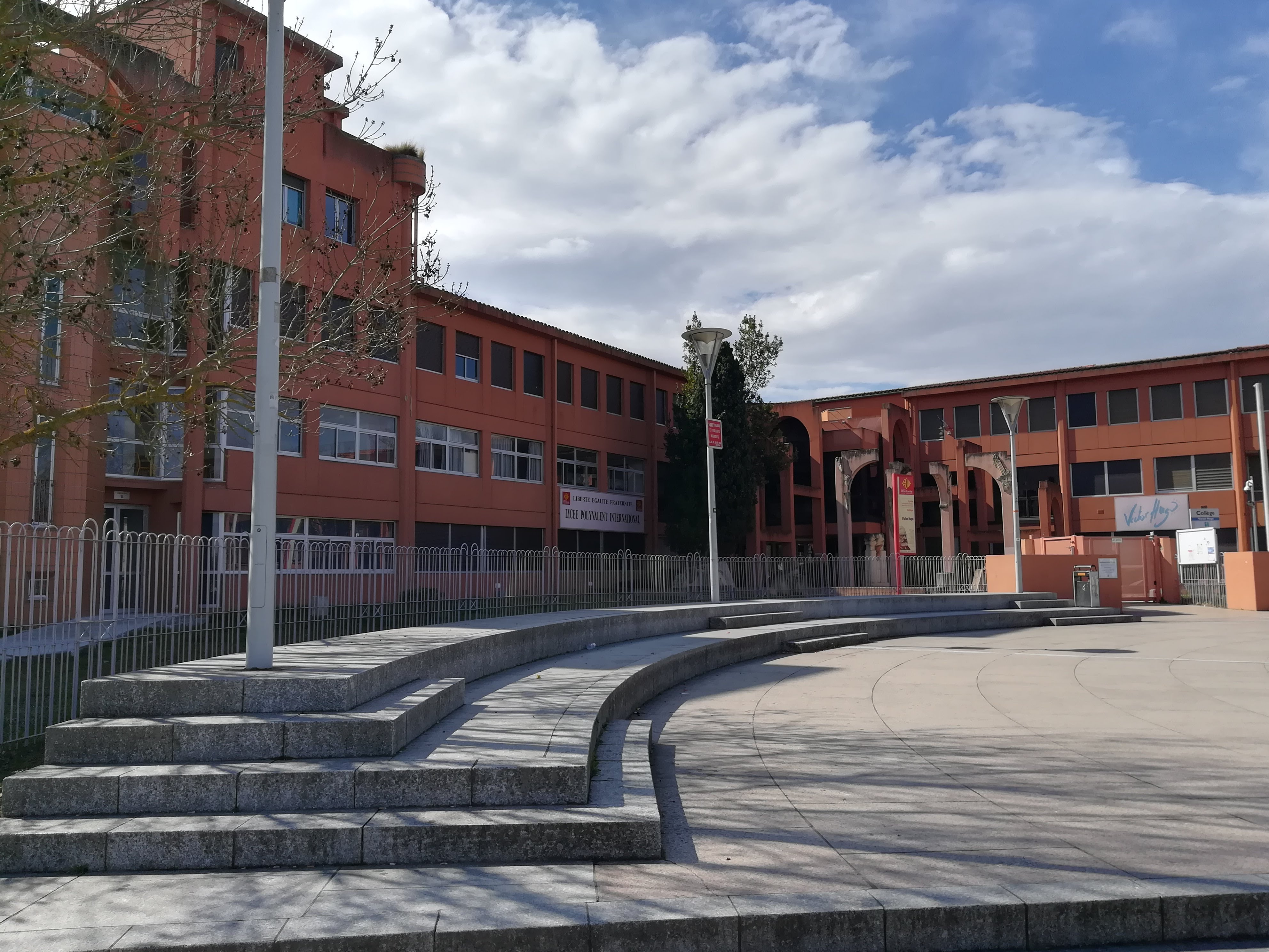 La place devant le Lycée International Victor Hugo à Colomiers.